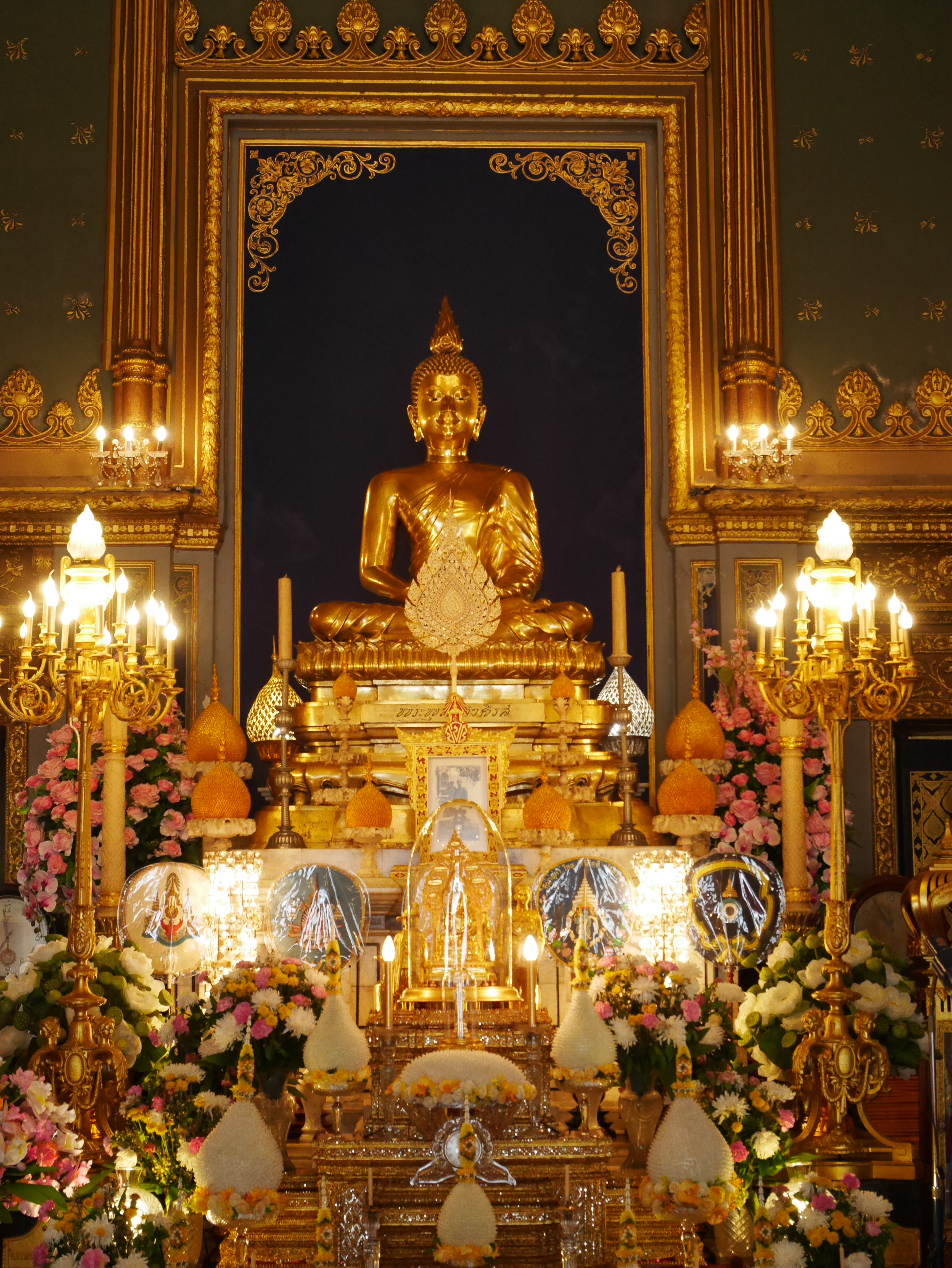 วัดราชบพิธ